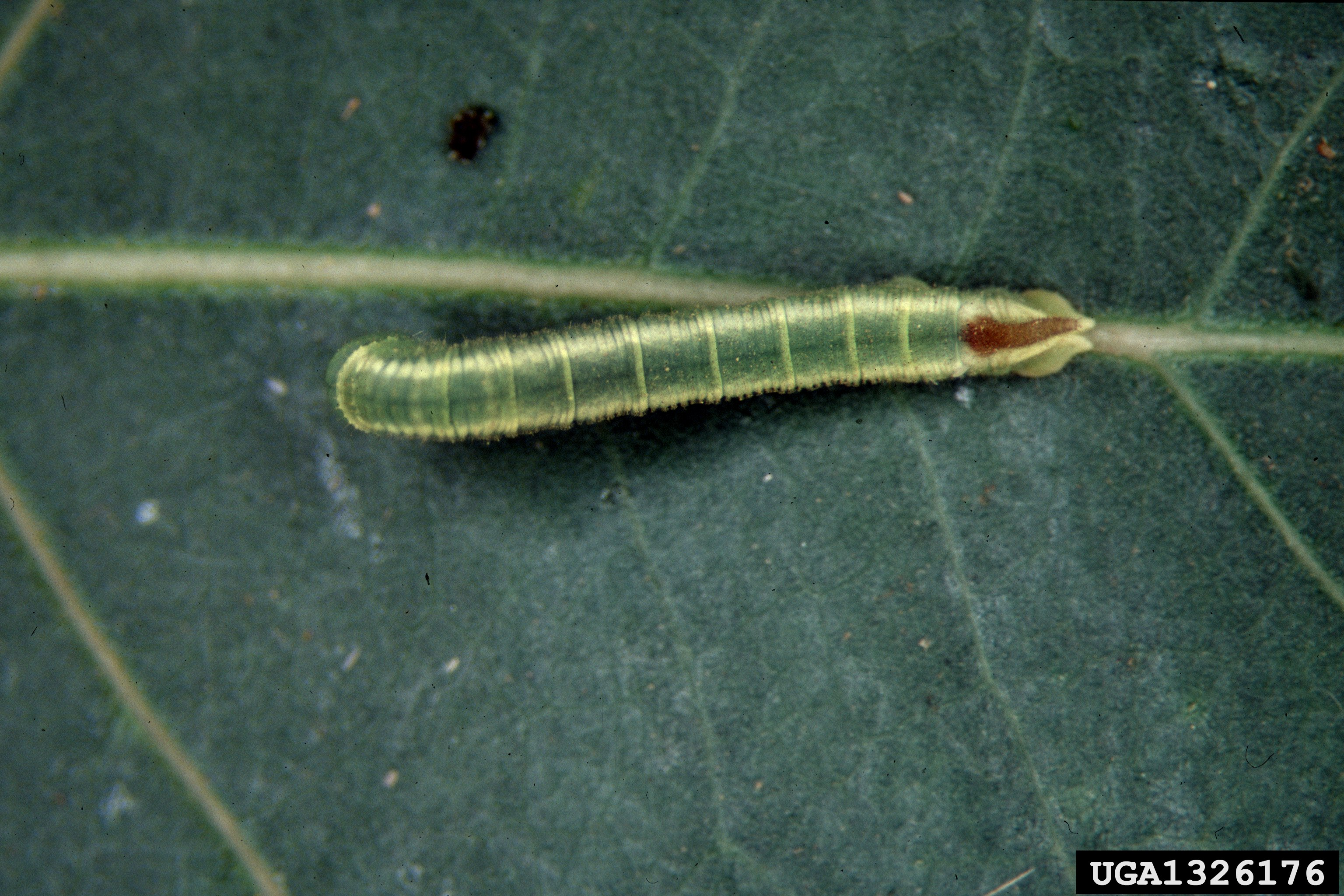 Pachysphinx occidentalis, larva